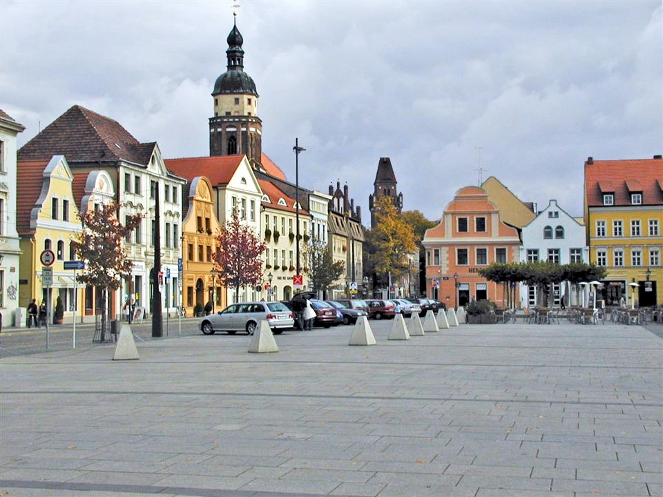 Der Altmarkt in Cottbus